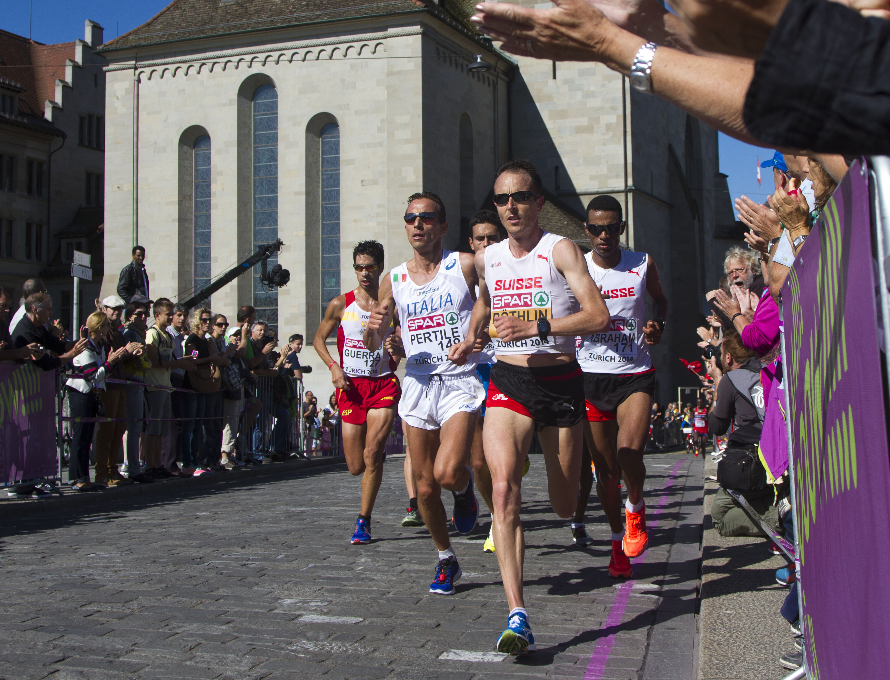 990447 marathon favorietengroep